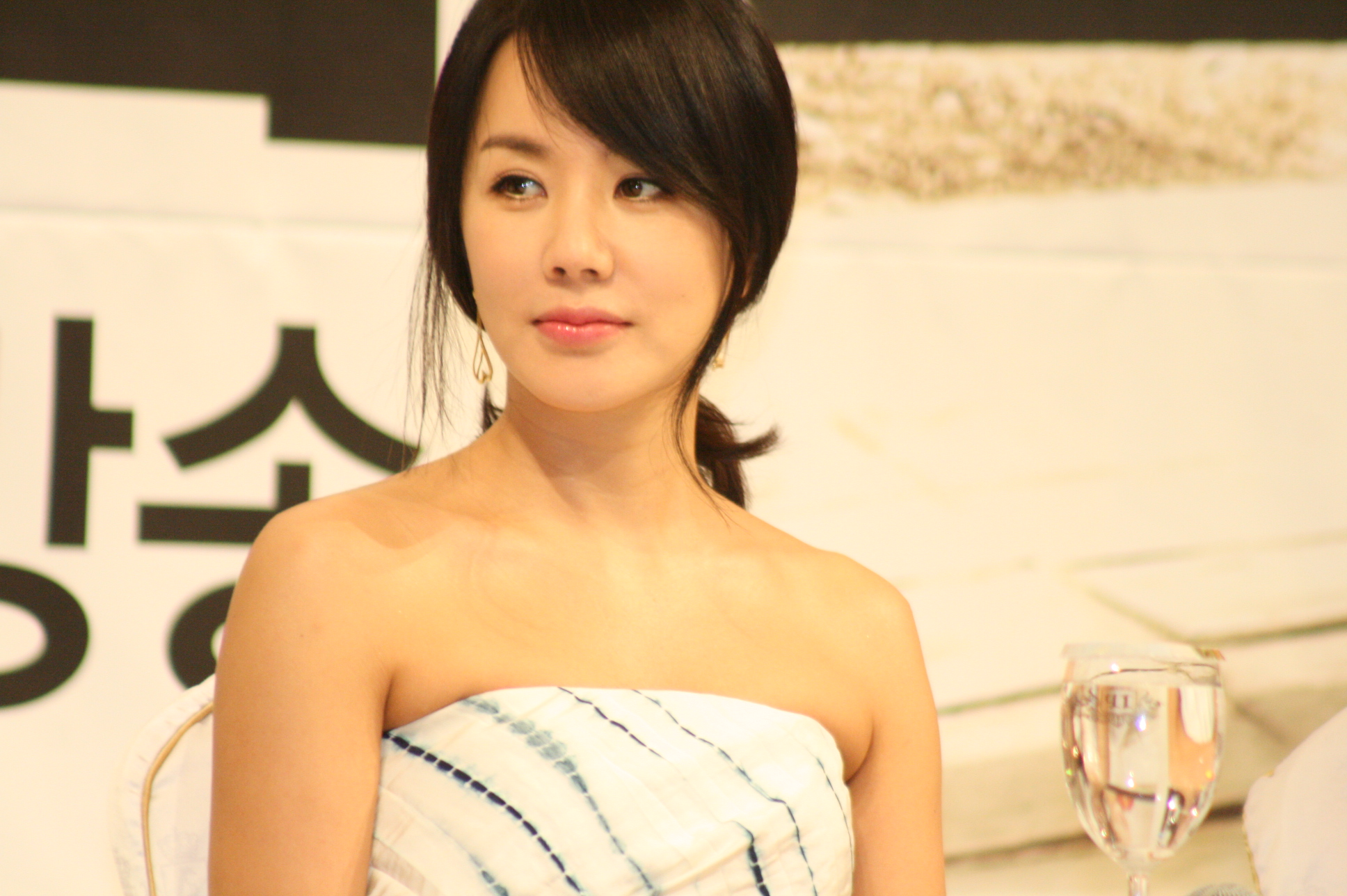 2009년 6월 9일 서울 임페리얼 팰리스 호텔에서 열린 KBS 드라마 《결혼 못하는 남자》 제작발표회에 참석한 엄정화.